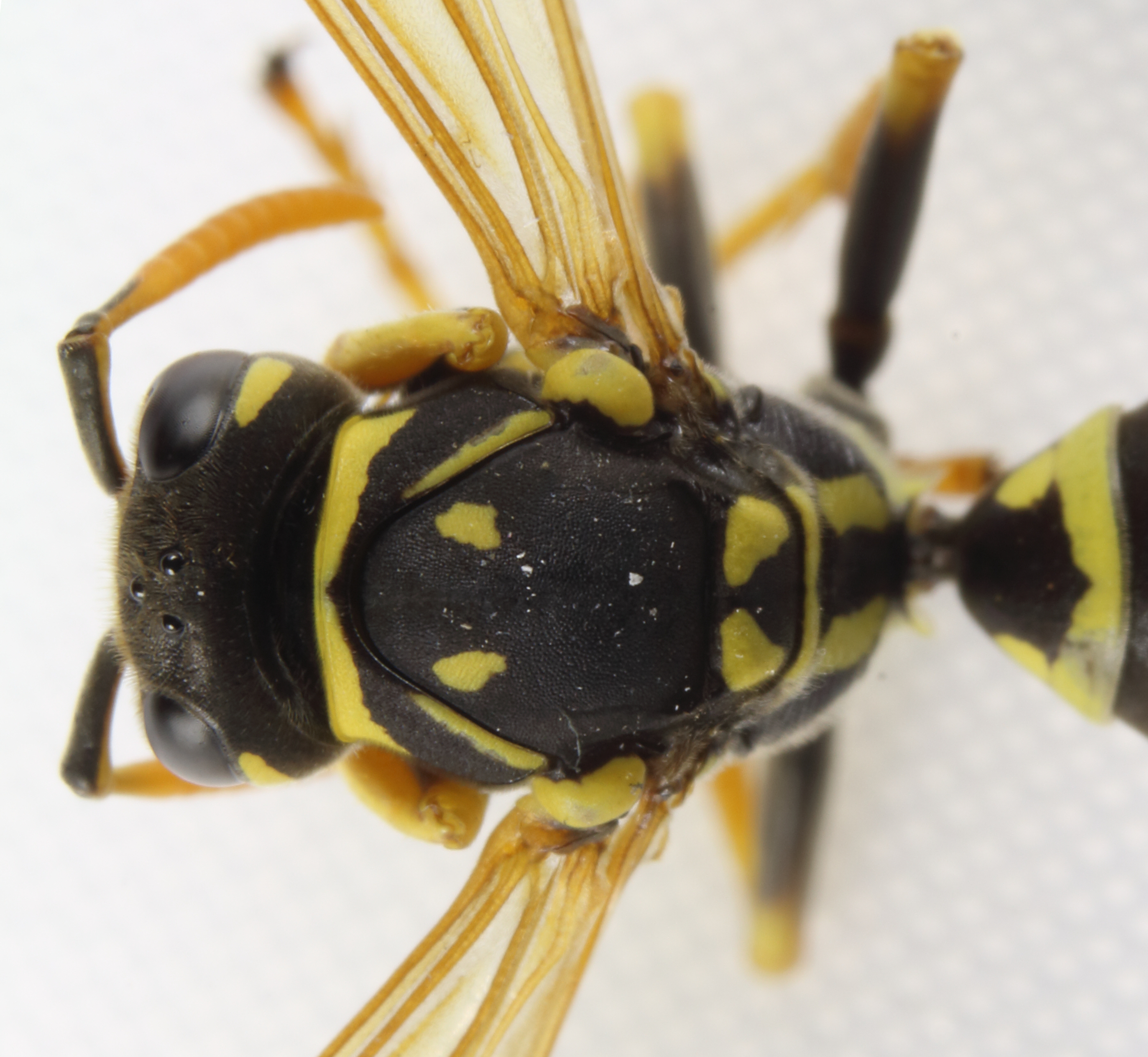 Gallische Feldwespe Polistes dominula, Detail Brust (Thorax) Das abgebildete Insekt wurde von mir selbst bestimmt The insect shown here has been identified by myself